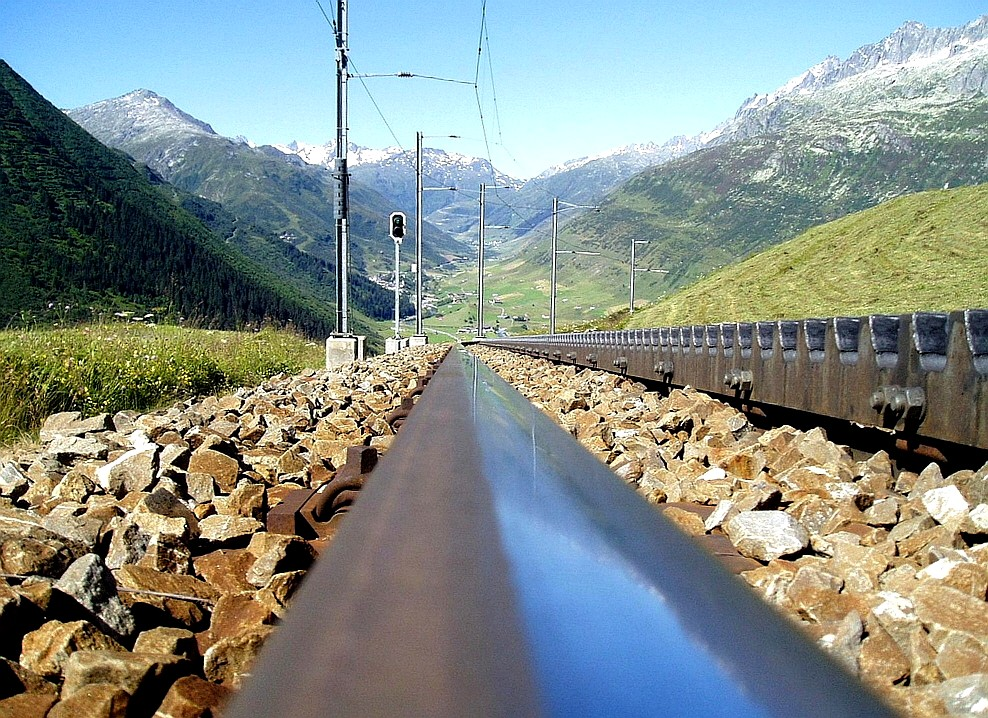 Aufgenommen in Andermatt, Kanton Uri